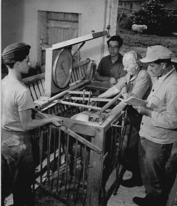 Cannewitz, Bauern beim Wiegen eines Schweins Zentralbild Schaar 29.6.1960 Auf gute Erfolge bei der Schweineaufzucht und Mast. Kann die mit dem Titel "Brigade der sozialistischen Arbeit" ausgezeichnete Arbeitsgruppe des VEG Cannewitz, Kreis Grimma, zurückblicken. 16.6 Ferkel pro Sau wurden von ihnen 1959 aufgezogen und die Masttiere brachten sie innerhalb von 6 Monaten von dem Einstellgewicht von 30 kg auf das Schlachtgewicht von 110 kg. UBz: Mitglieder der "Brigade der sozialistischen Arbeit" beim Wiegen der Mastschweine."